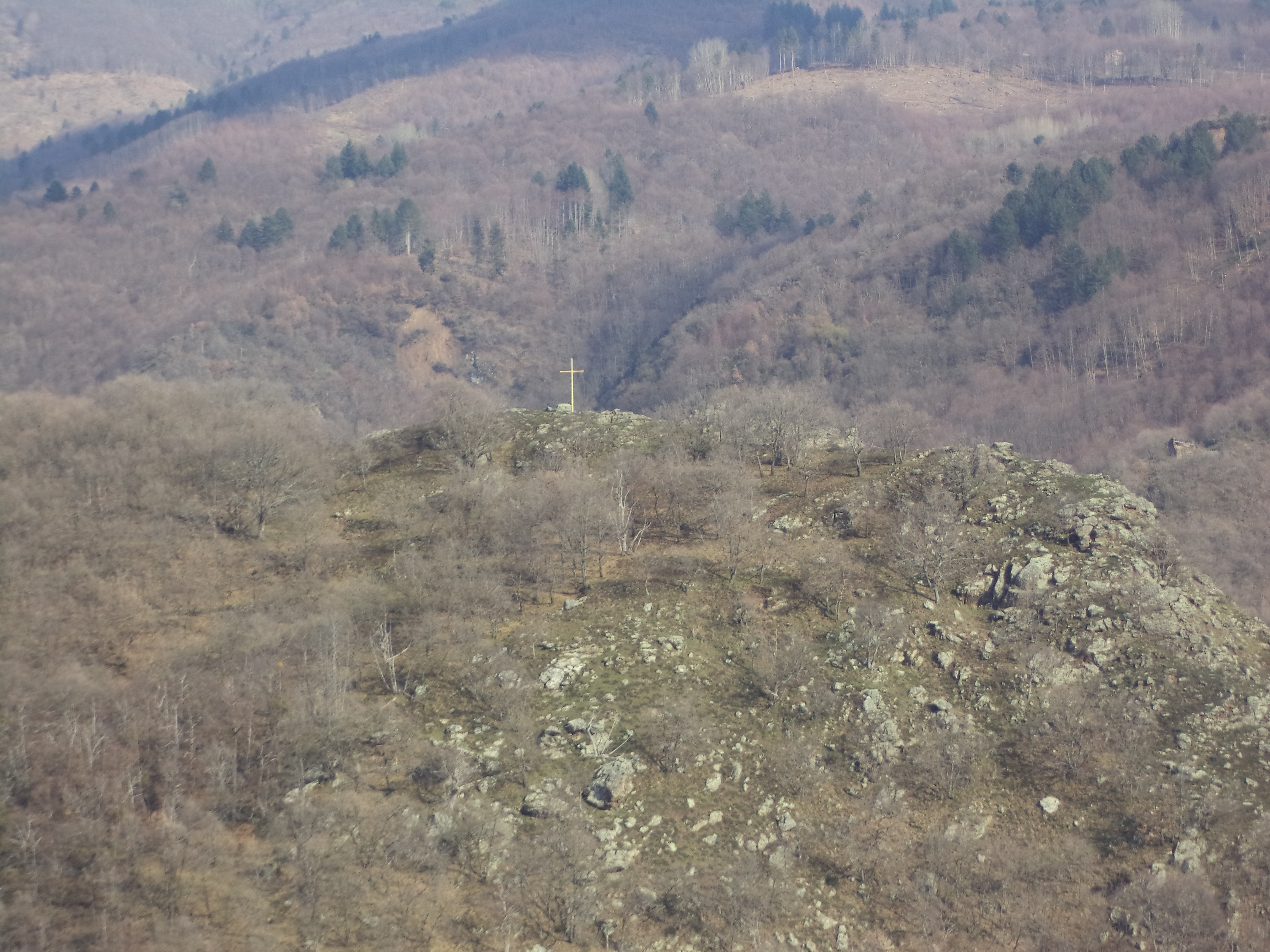 Il Petrone, monte nel terriorio di Pedace